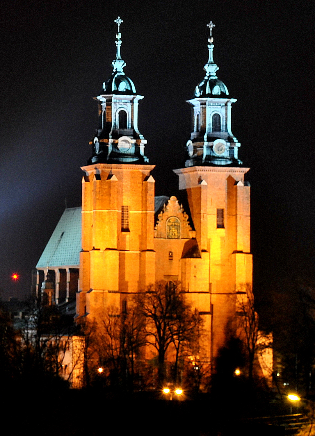 Widok od strony cmentarza św. Piotra i Pawła